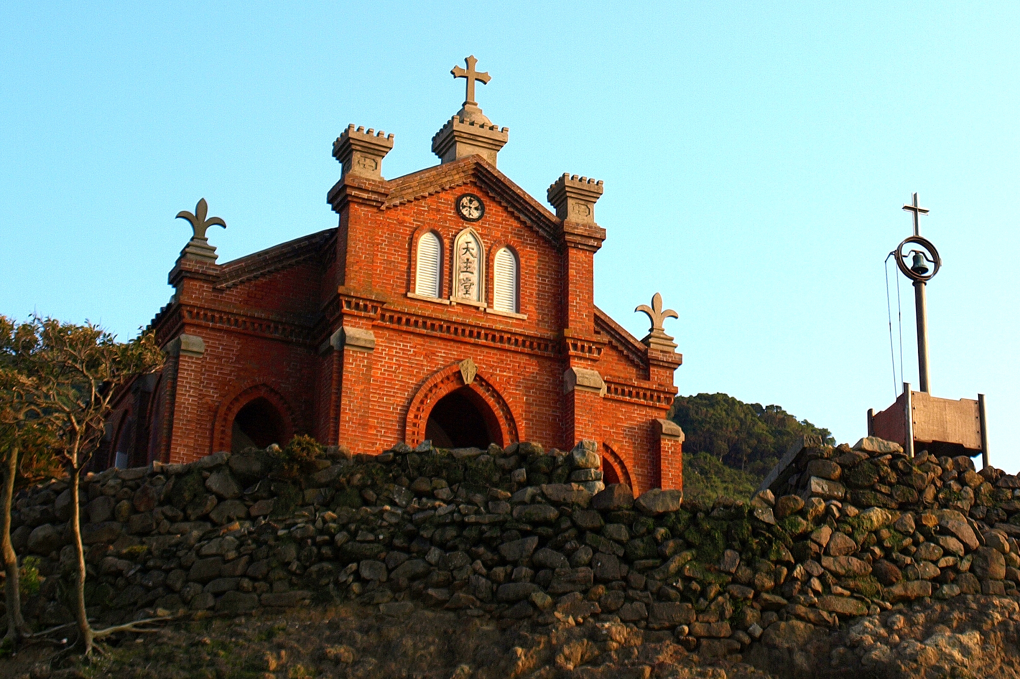 長崎県小値賀町野崎島にある野首教会。